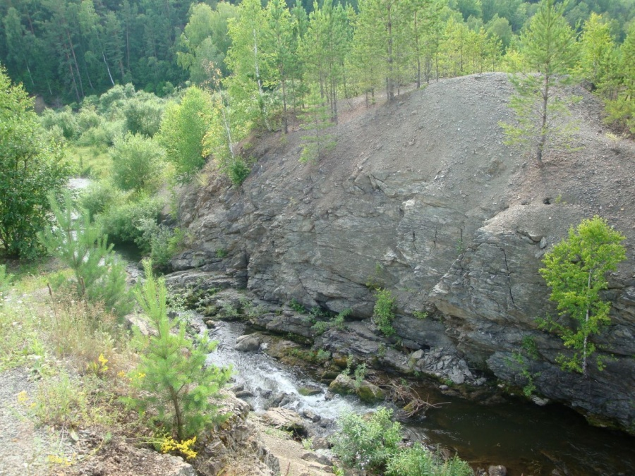 р. Буготак